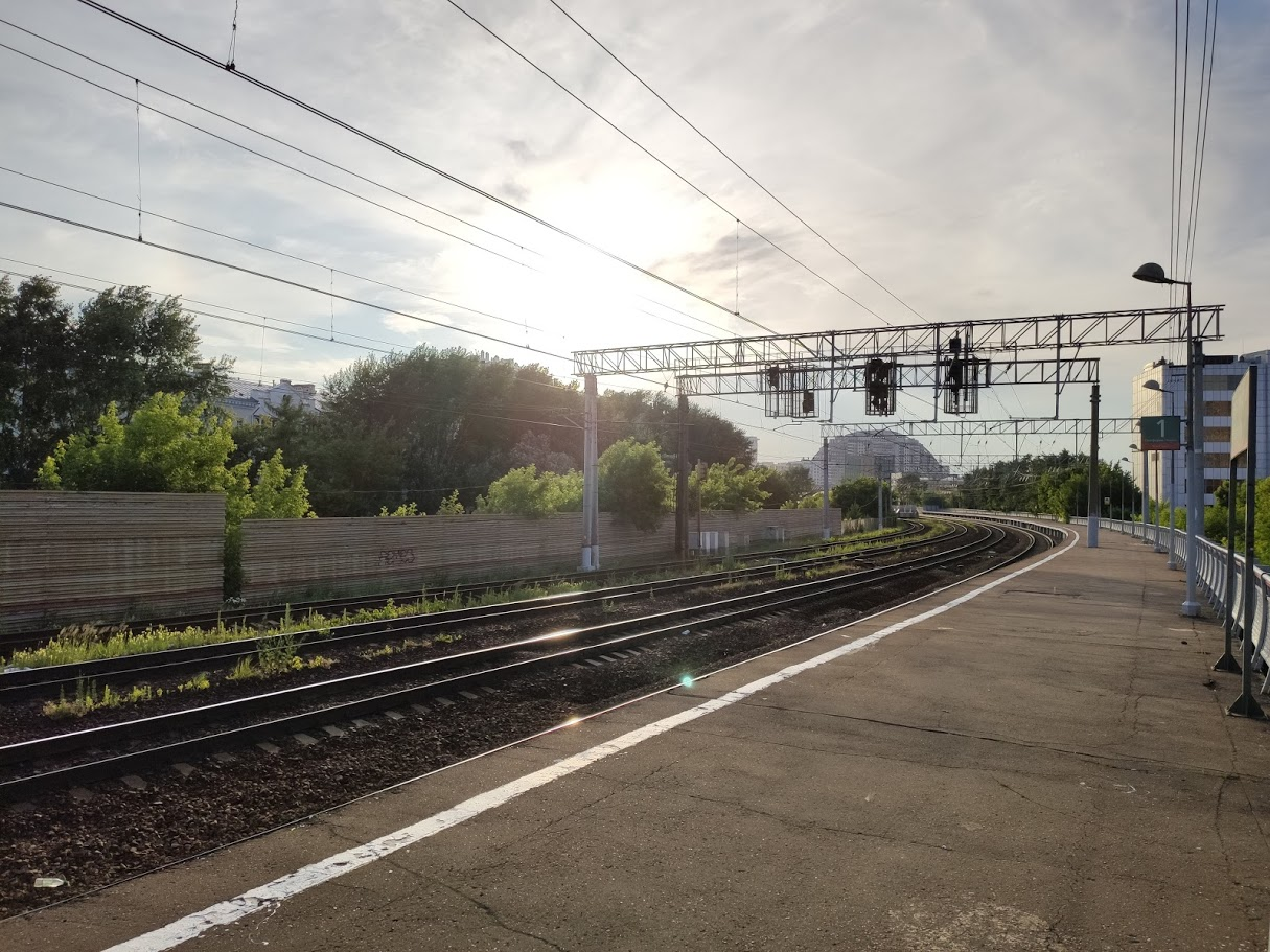 Вид с неиспользуемой платформы №1 о.п. Электрозаводская в сторону Казанского вокзала